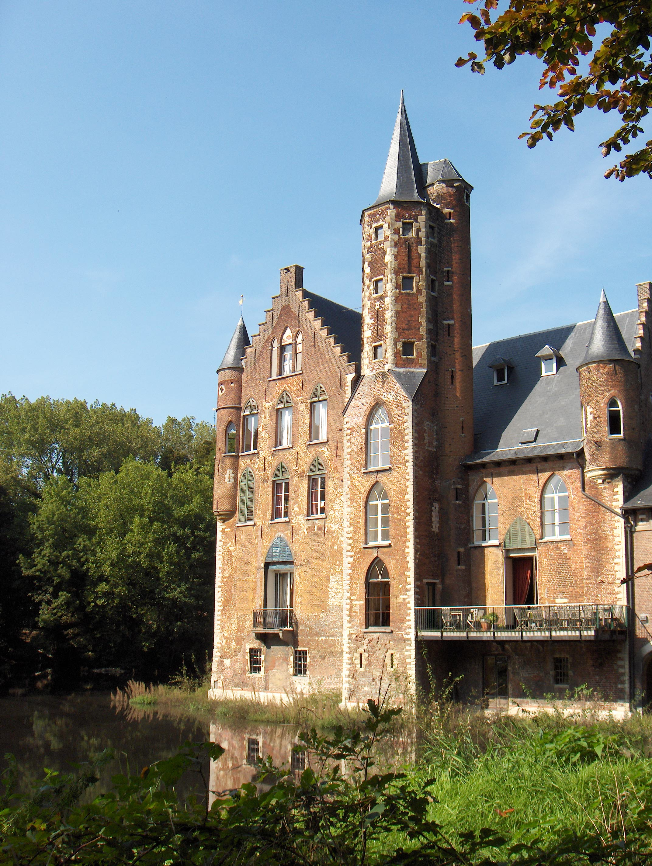 Beschreibung: Schloss Wissekerke, Bazel (Belgien, Ortsteil der Gemeinde Kruibeke). Ältester Teil aus dem 15. Jh.; sonst Anfang des 19. Jh., Frühneugotik. Fotograf: Friedrich Tellberg Datum: 4. September 2005